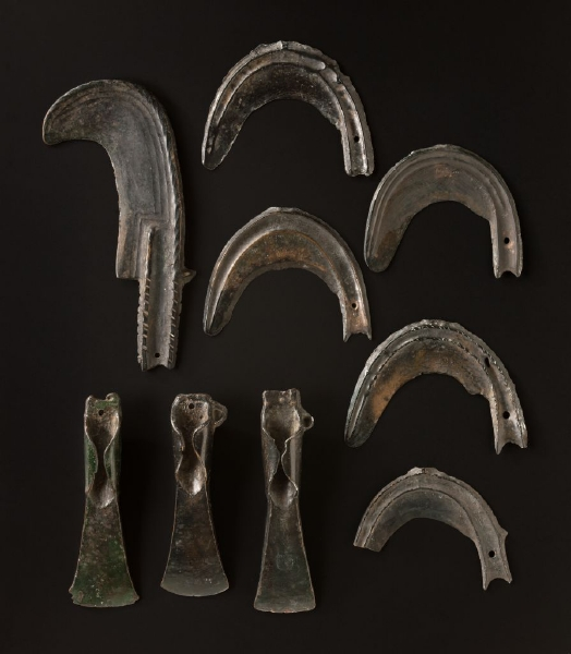 Bronzedepotfund von Winterlingen, Zollernalbkreis, späte Urnenfelderzeit; Copyright Notice CC BY-SA